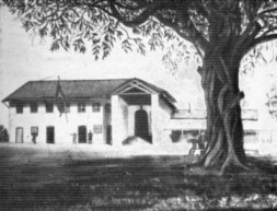 Foto do Solar dos Andradas, casa de José Bonifácio de Andrada localizada no bairro de Santana, São Paulo - Brasil